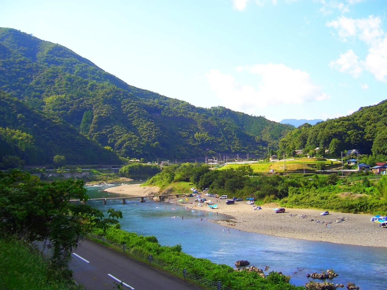 takasunrise0921が撮影